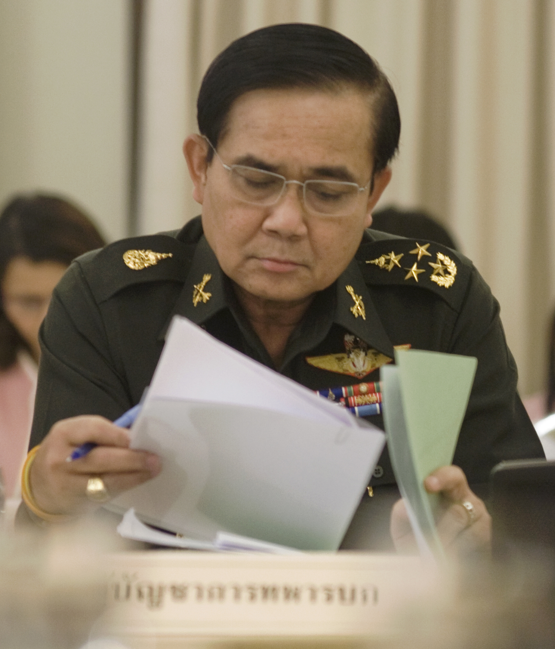 นายกรัฐมนตรี เป็นประธานการประชุมคณะกรรมการรัฐมนตรีพัฒนาพื้นที่พิเศษ 5 จังหวัดชายแดนภาคใต้ ครั้งที่ 2/2553 ณ ตึกสันติไมตรีหลังใน ทำเนียบรัฐบาล 17 มิถุนายน 2553 (The Official Site of The Prime Minister of Thailand Photo by พีรพัฒน์ วิมลรังครัตน์)